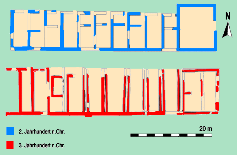 Befundpläne des Kasernenblocks im NO Sektor des Kastell Housesteads/Vercovicium am Hadrianswall, 2. und 3. Jahrhundert n.Chr.